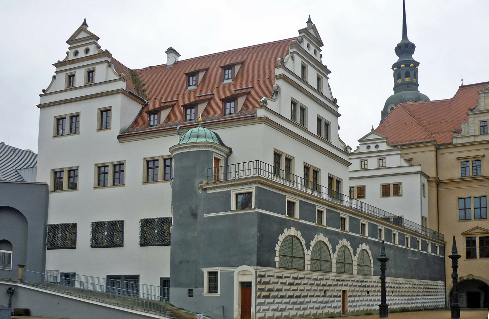 Blick vom Stallhof auf das Kanzleihaus in Dresden, Schloßstrasse 24